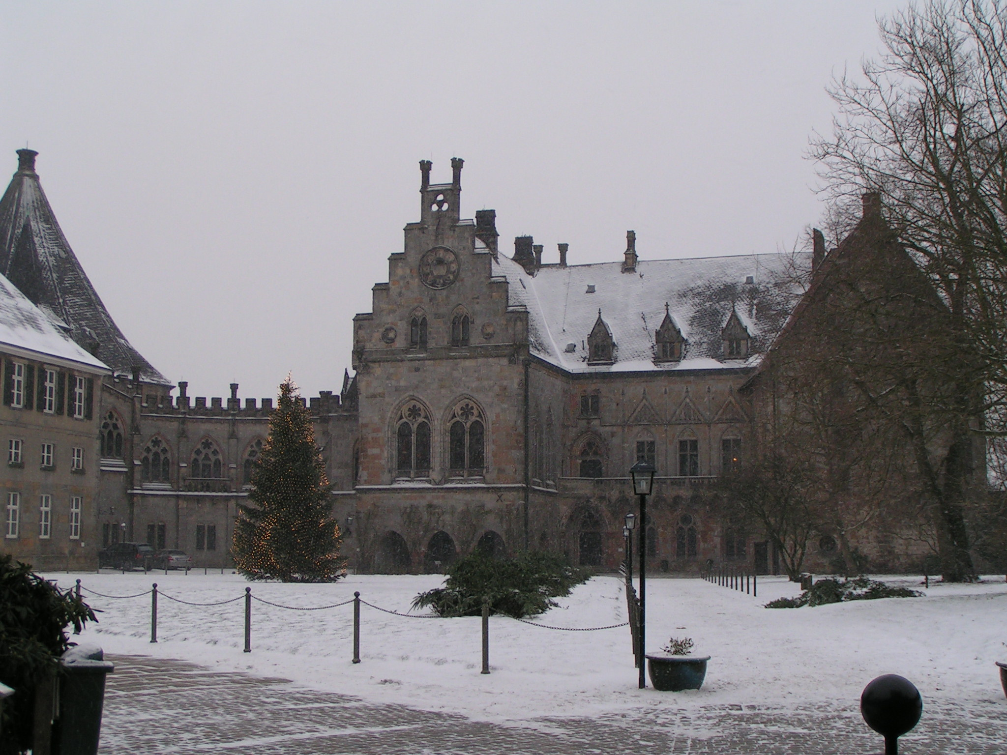 Burg Bentheim. Innenhof